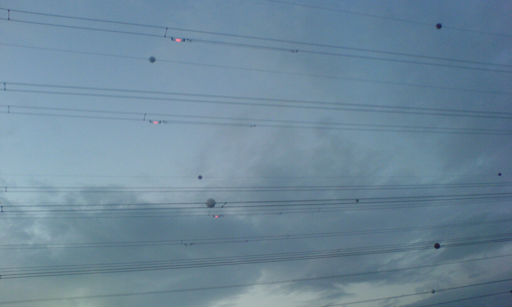 Balisor sur lignes EDF en France